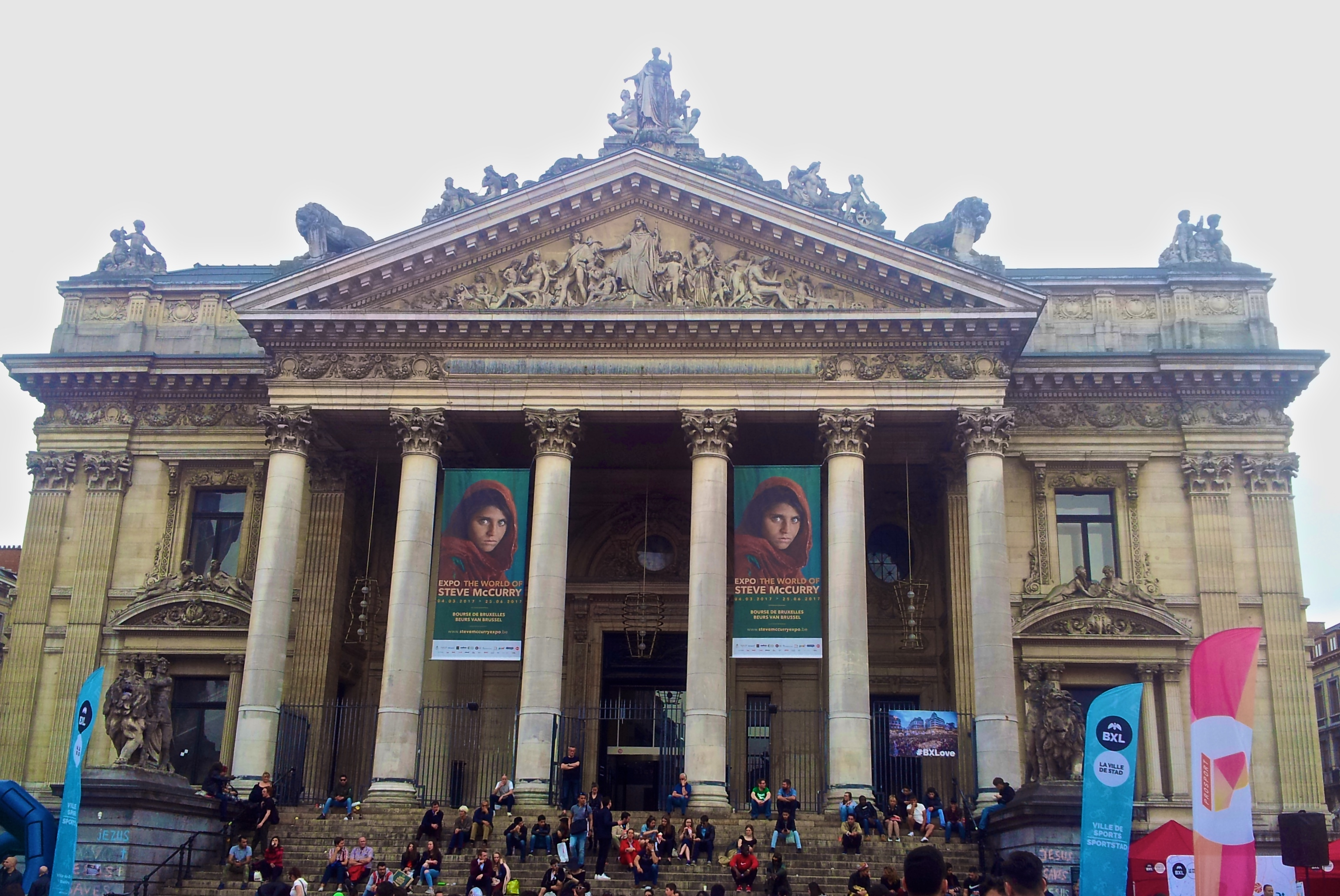 Affiche à l'effigie de Sharbat Gula pour informer le public sur l’exposition The World of Steve McCurry au Palais de la Bourse à Bruxelles - Mai 2017. Plus de 200 photos imprimées en grand format. Elle est la rétrospective dédiée au photographe Steve McCurry.